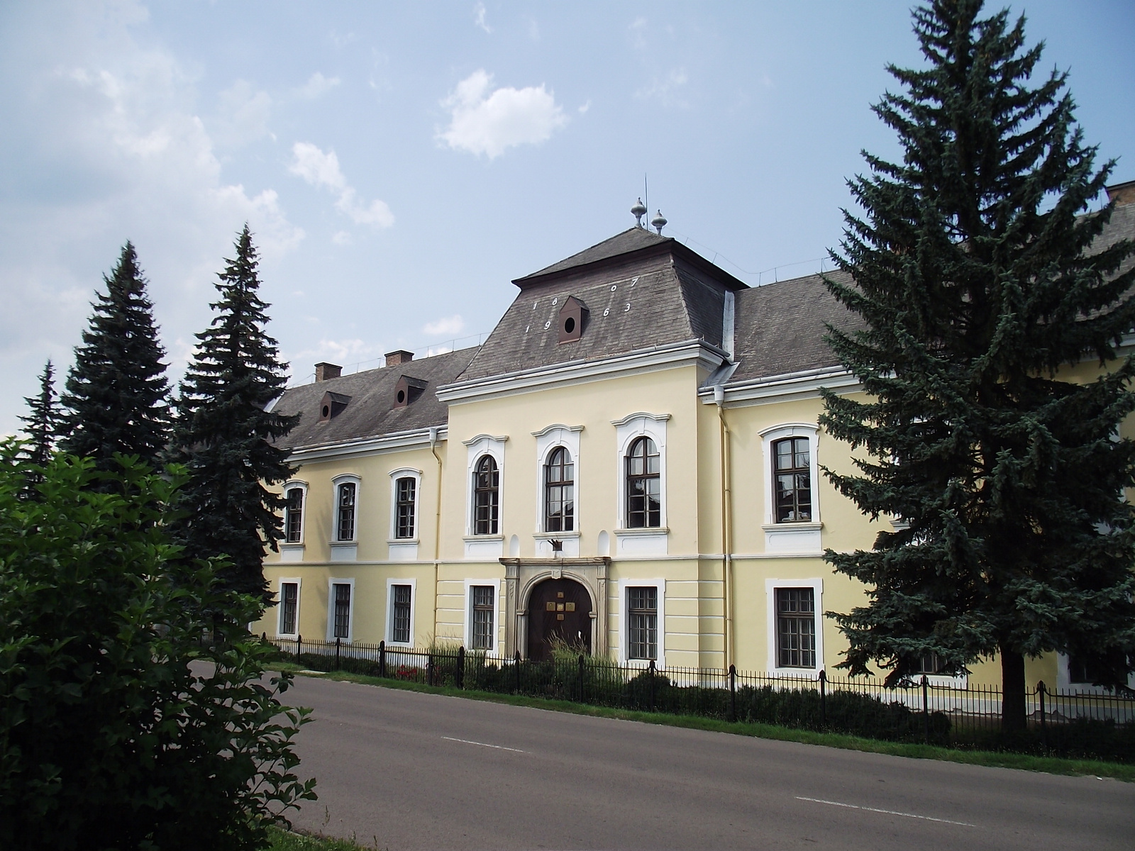 v. Keglevich-kastély (Pétervására, Keglevich út 91.) This is a photo of a monument in Hungary, Identifier: 5821